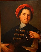 Jan Petr MOLITOR (1702-1756) - Podobizna muže s loutnou, 1741